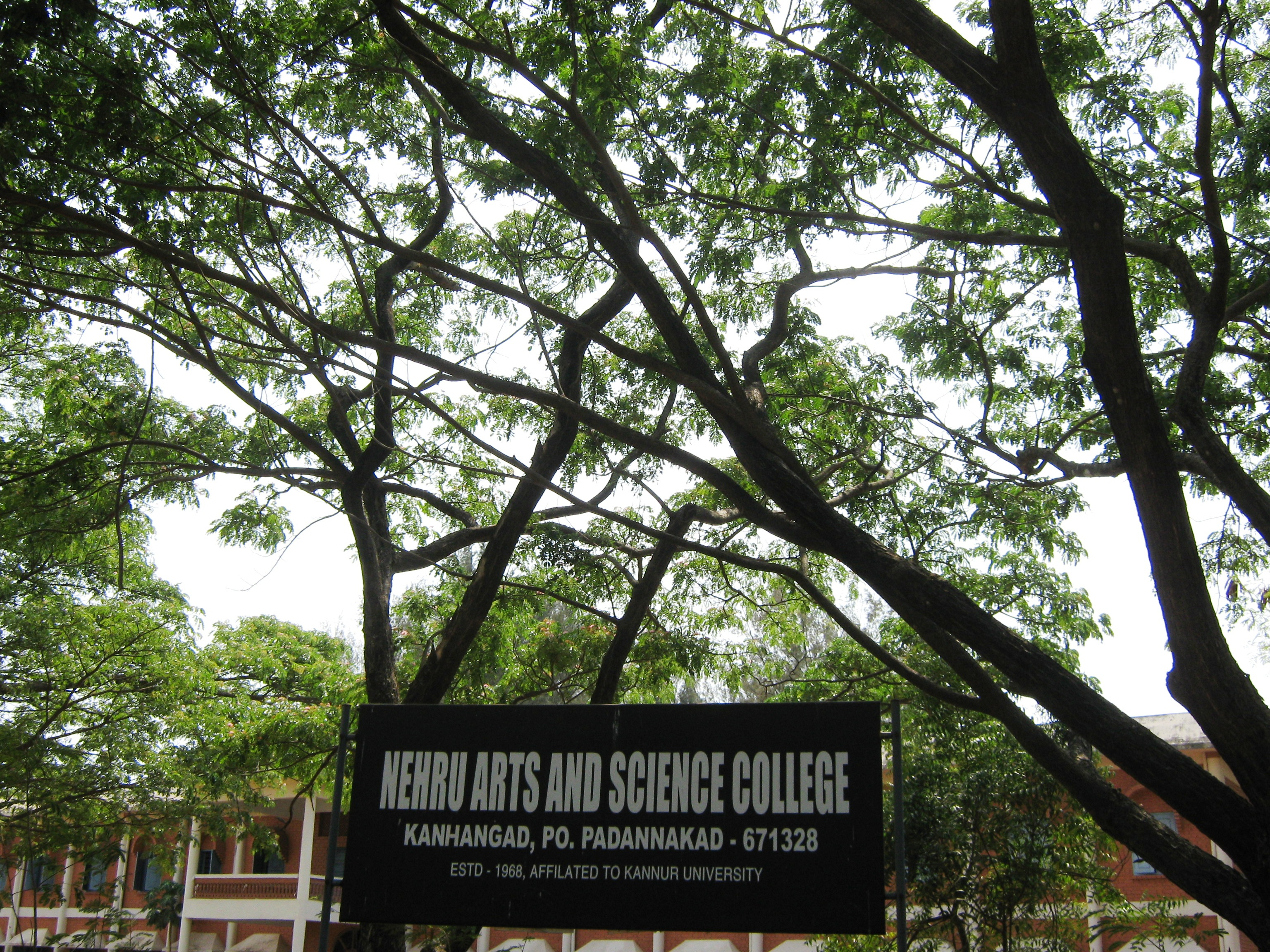 Kasargod, Kerala, India.